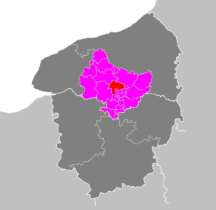 Maps of arrondissements and cantons of France: Arrondissement de Rouen - Canton de Notre-Dame-de-Bondeville.PNG